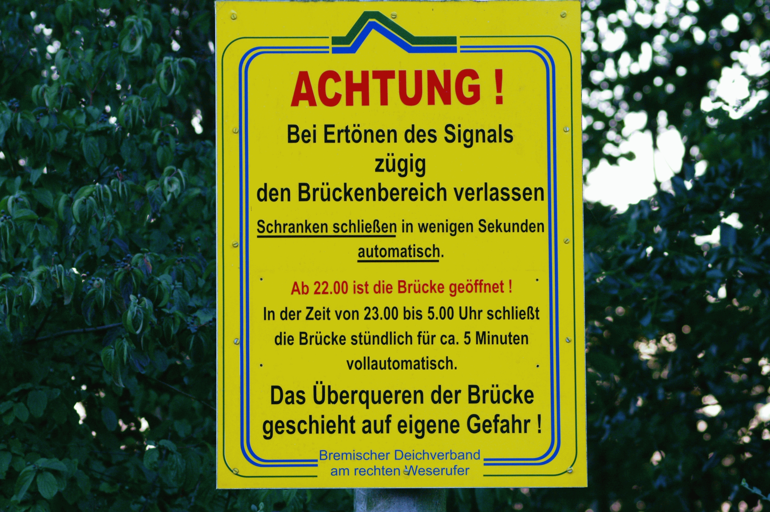 Lesumsperrwerk, Hinweisschild an der Brücke mit den Öffnungszeiten